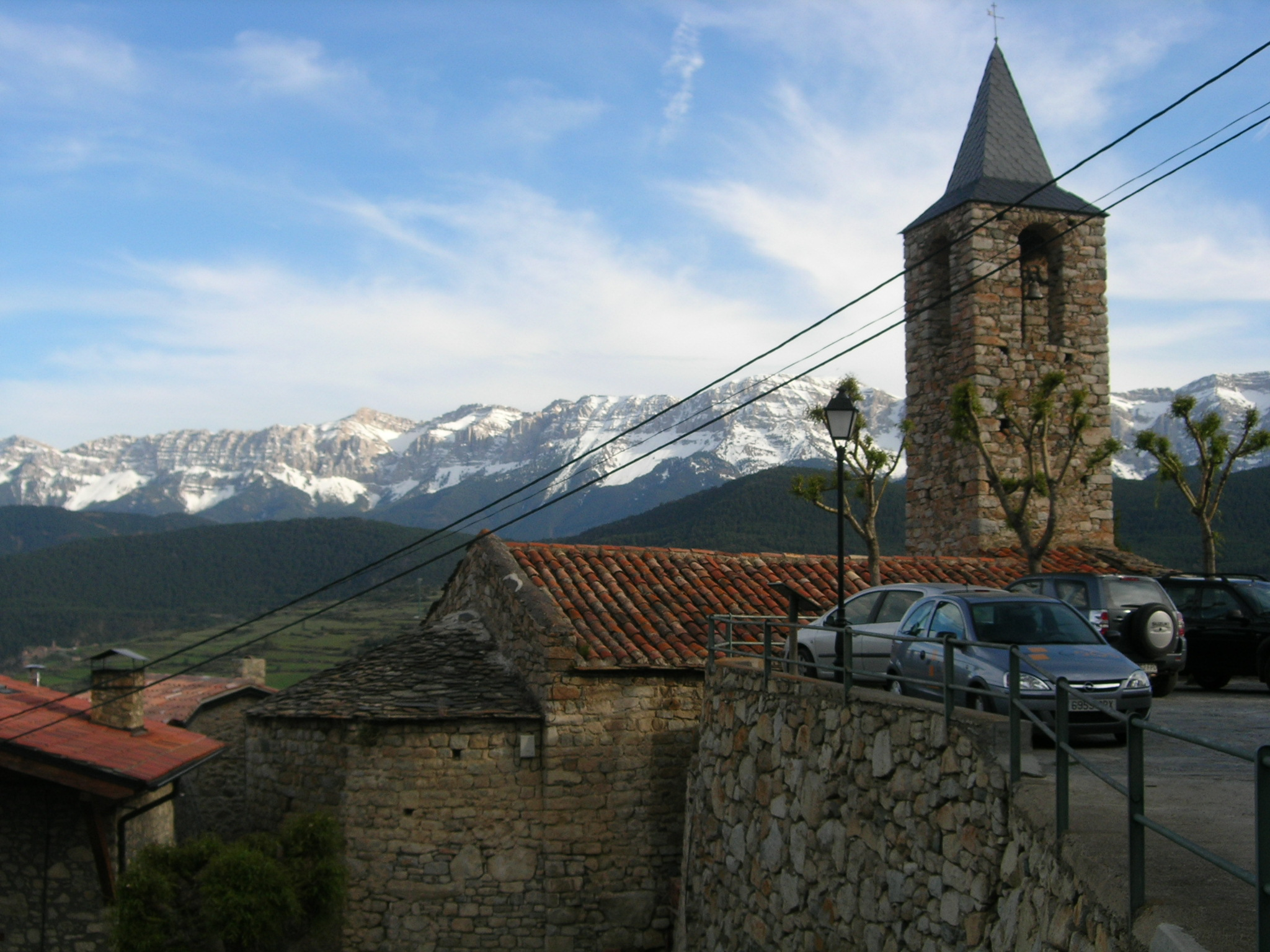 Serres del Cadí-el Moixeró This is a a photo of a natural area in Catalonia, Spain, with id: ES510202